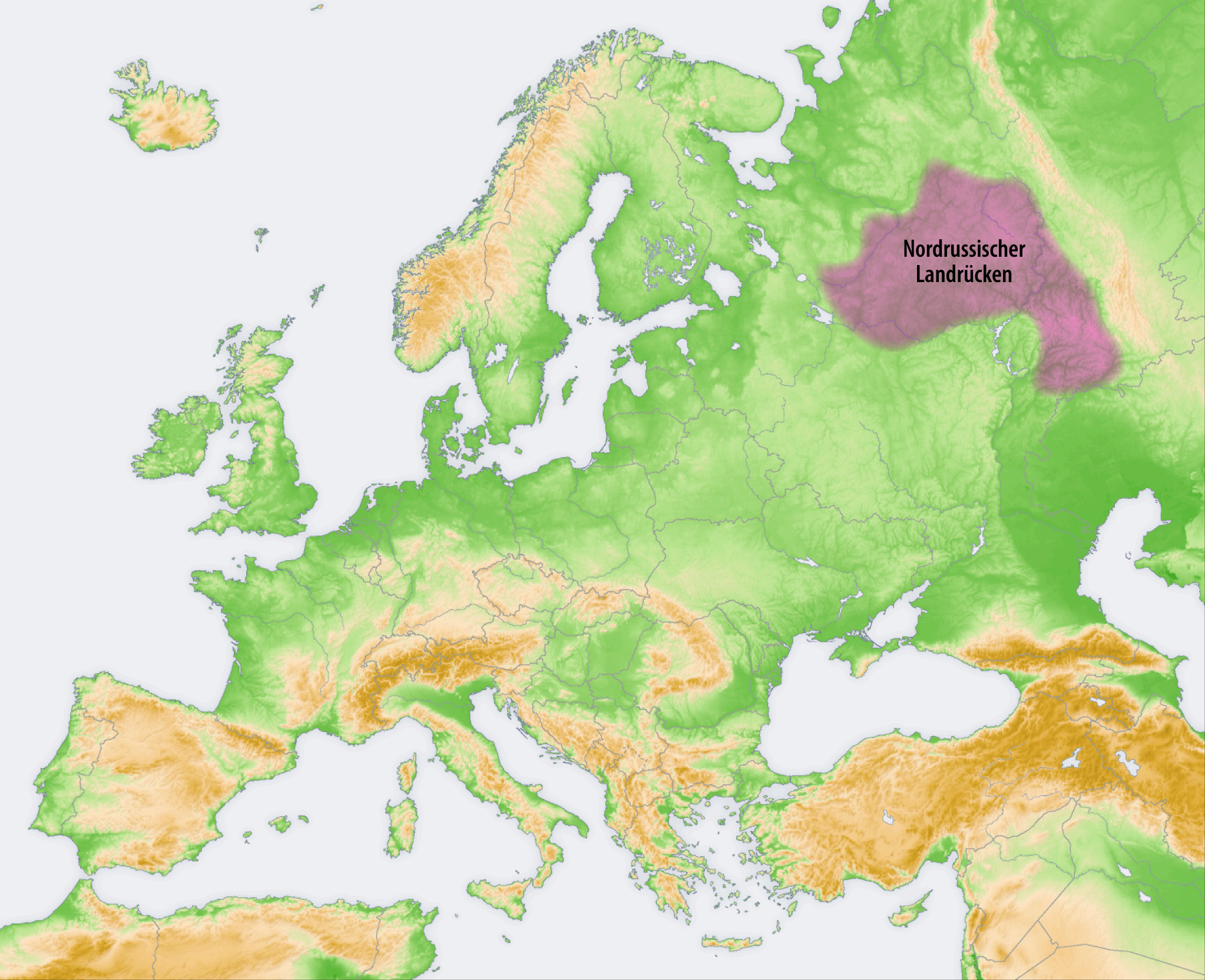 Landschaften der Osteuropäischen Ebene: Nordrussischer Landrücken